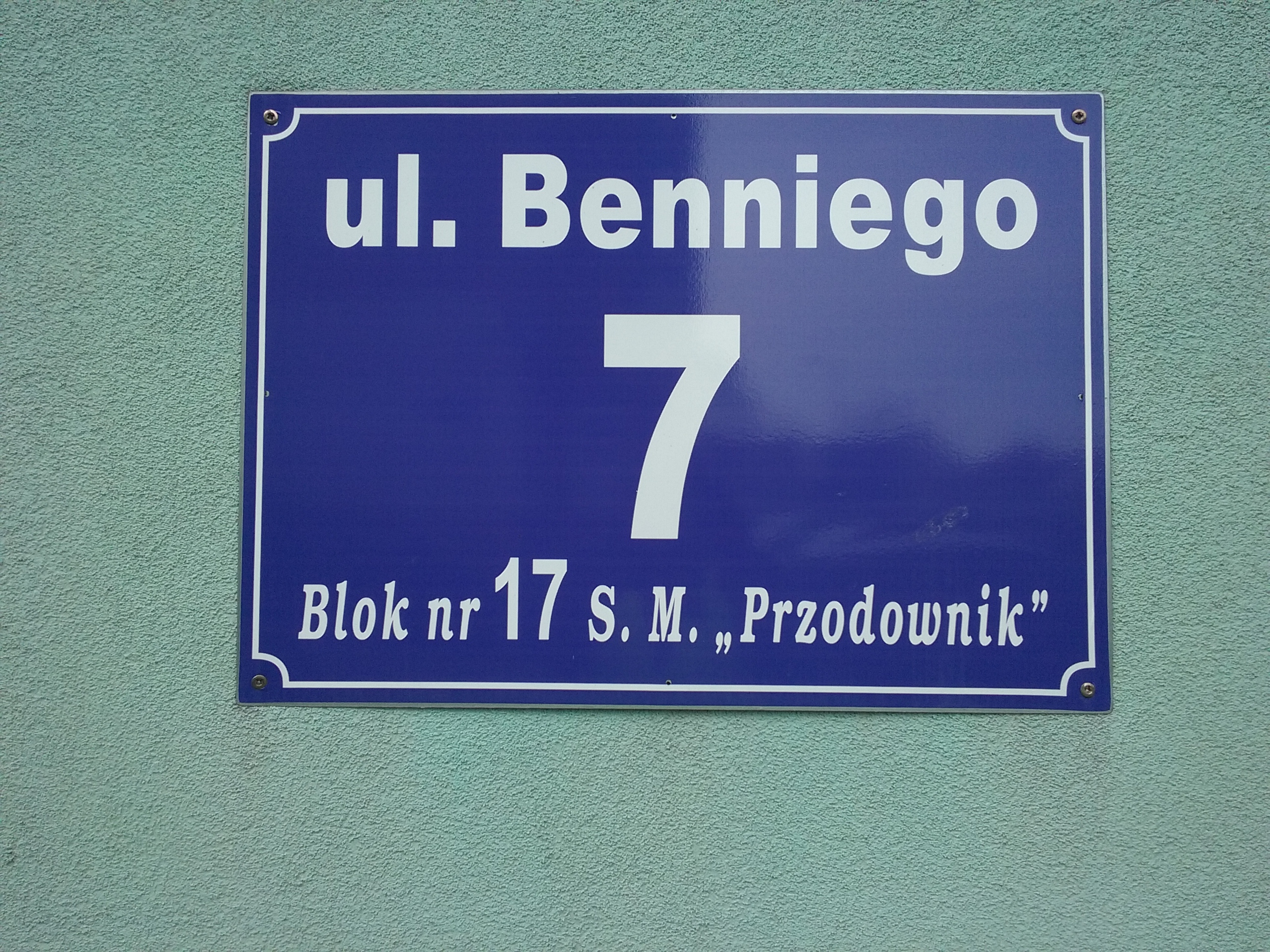 Tomaszów Mazowiecki w województwie łódzkim. Tabliczka informacyjna przy ulicy Karola Beniego. PL,EU,CC0